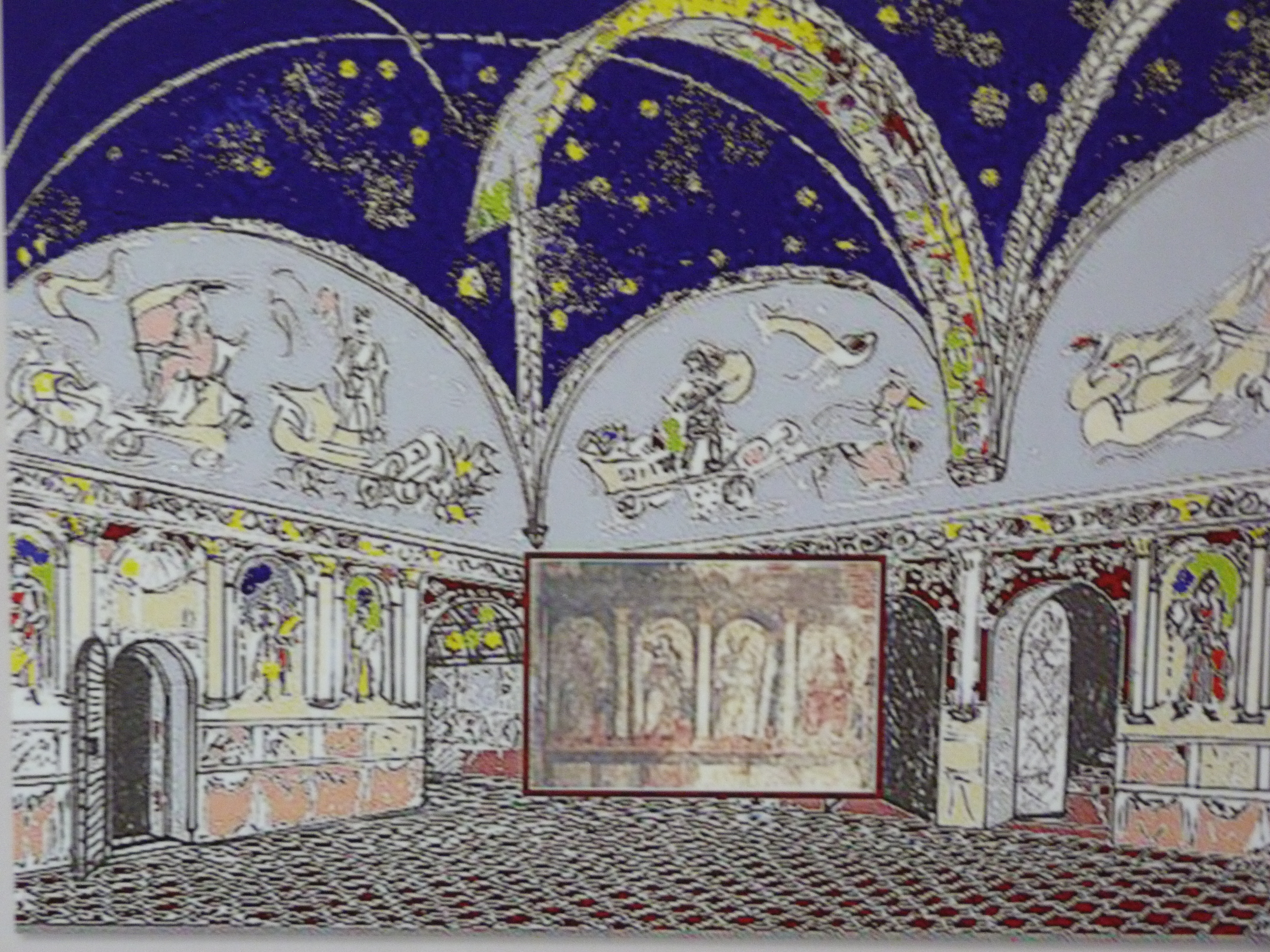 Esztergom. Királyi Vár. Temperantia restaurálási koncepció. Sandro Botticelli vagy Sandro Botticelli műhelyéből. Források: Magyar Nemzeti Múzeum Esztergomi Vármúzeuma 2500 Esztergom, Szent István tér 1 szám. + 36 33 500135 Elkészült az Esztergomi Vármúzeum Magyar Nemzet online 2015 április 17A - - ©© Derzsi Elekes Andor, Budapest, 2015, A fénykép másolását és felhasználását a szerző ellenérték nélkül megengedi. Az engedély kiterjed a kereskedelmi célú hasznosításra is. Kéri azonban nevének feltüntetését a felhasználás során. A Metapolisz sorozat valamennyi képe és filmje Creative Commons alatti. kereskedelmi - for profit - célra is felhasználható. Ajánlott hivatkozás: Derzsi Elekes Andor: Metapolisz DVD line